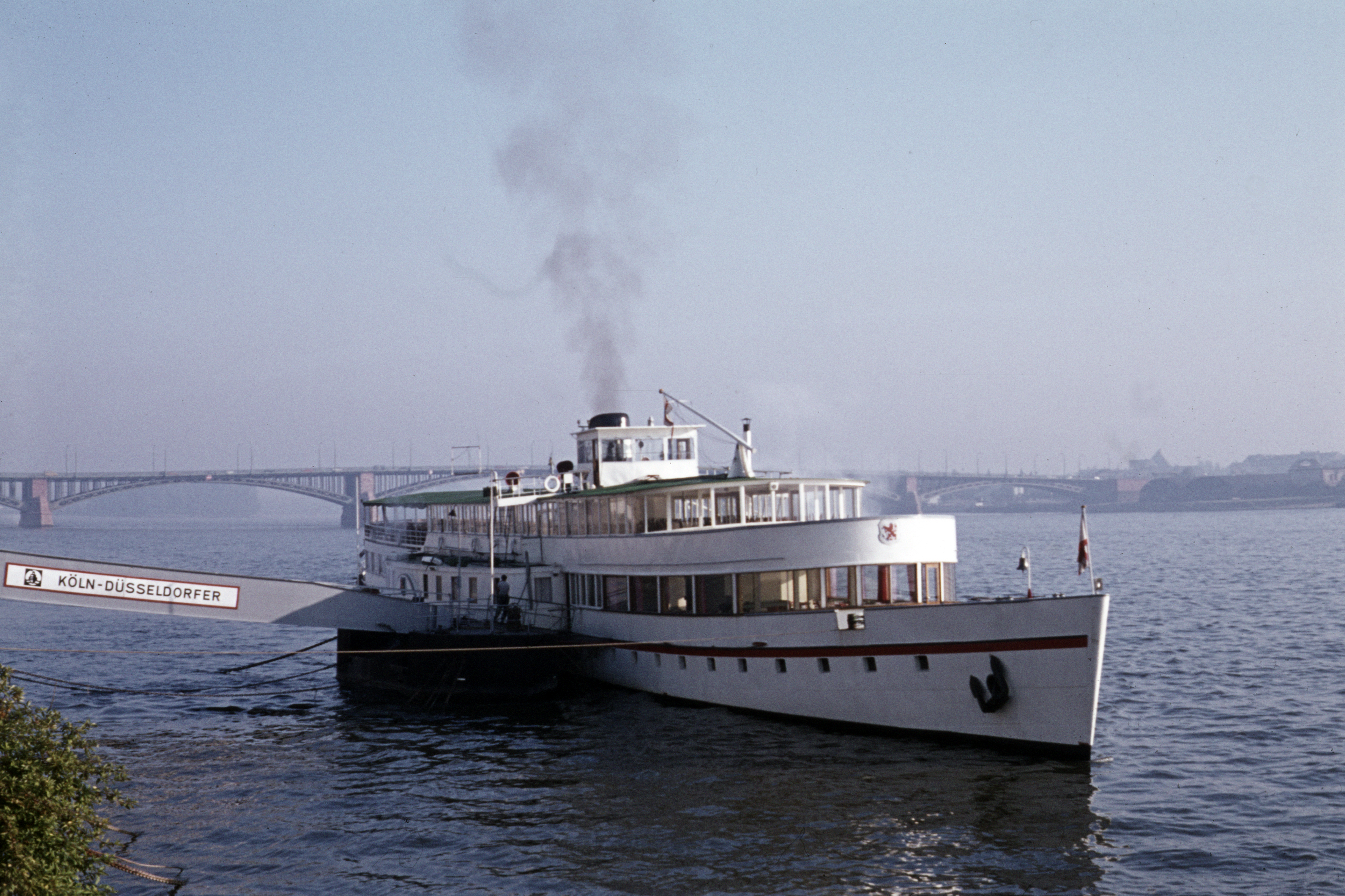 Der Raddampfer Bismarck im August 1973 in Mainz.